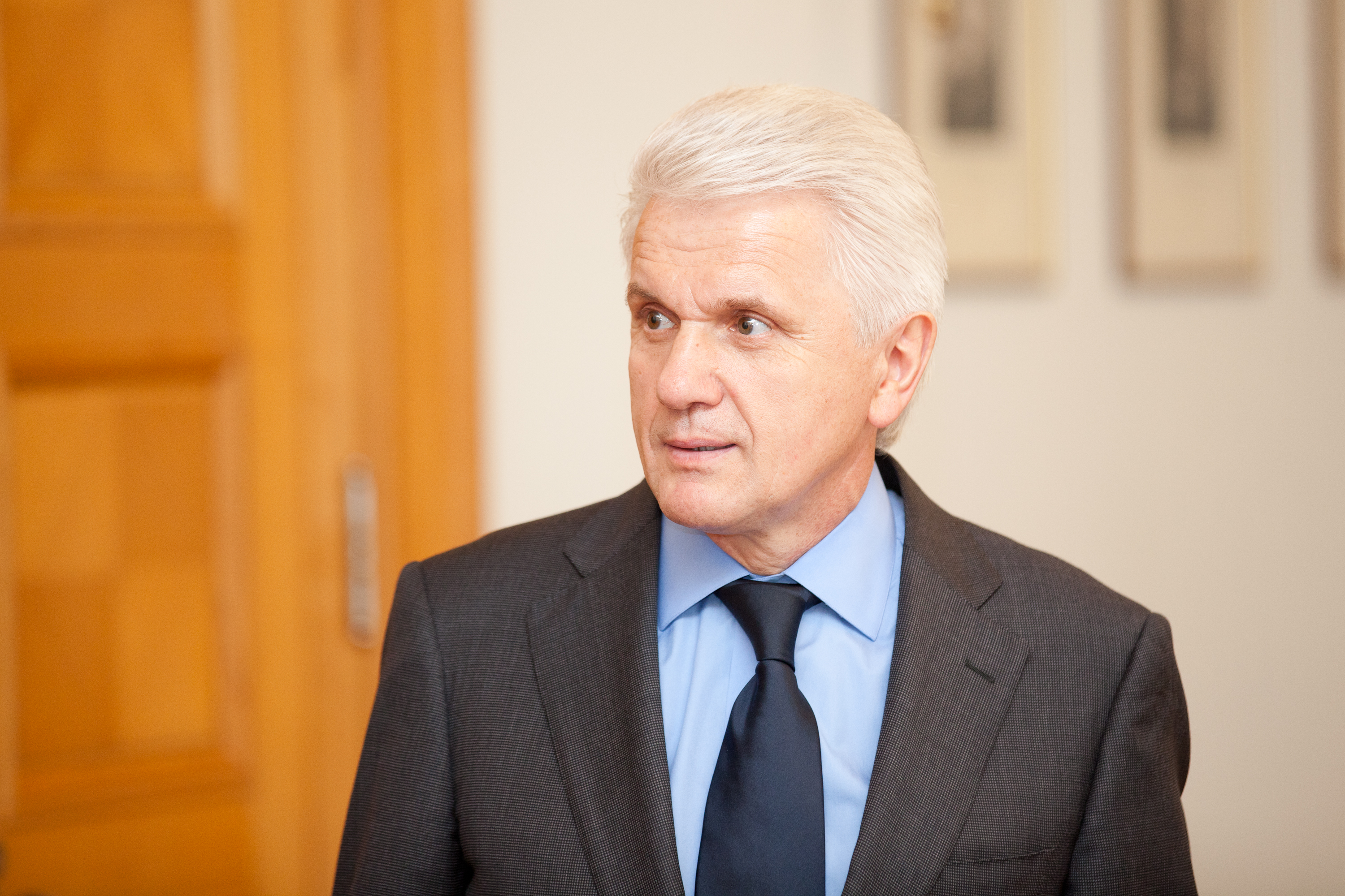 Foto: Toms Norde, Valsts kanceleja